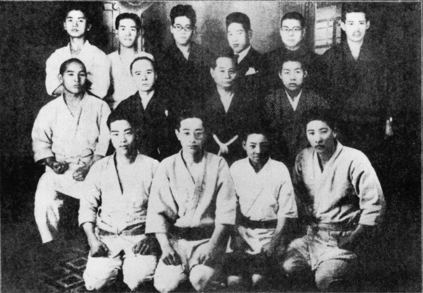 大正15年の本部流(Motobu-Ryu in 1926)